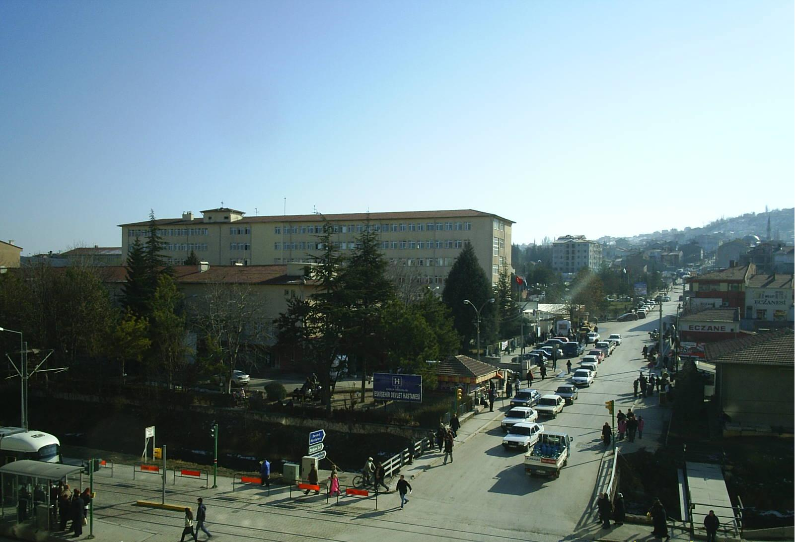 Eskişehir Devlet Hast.